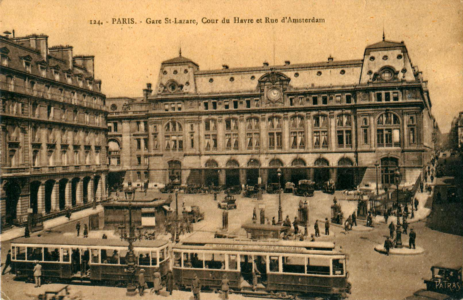 Carte postale ancienne éditée par Patras, n°124 :PARIS - Gare St-Lazare, Cour du Havre et Rue d'Amsterdam